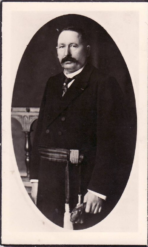 Heer van Zwevezele